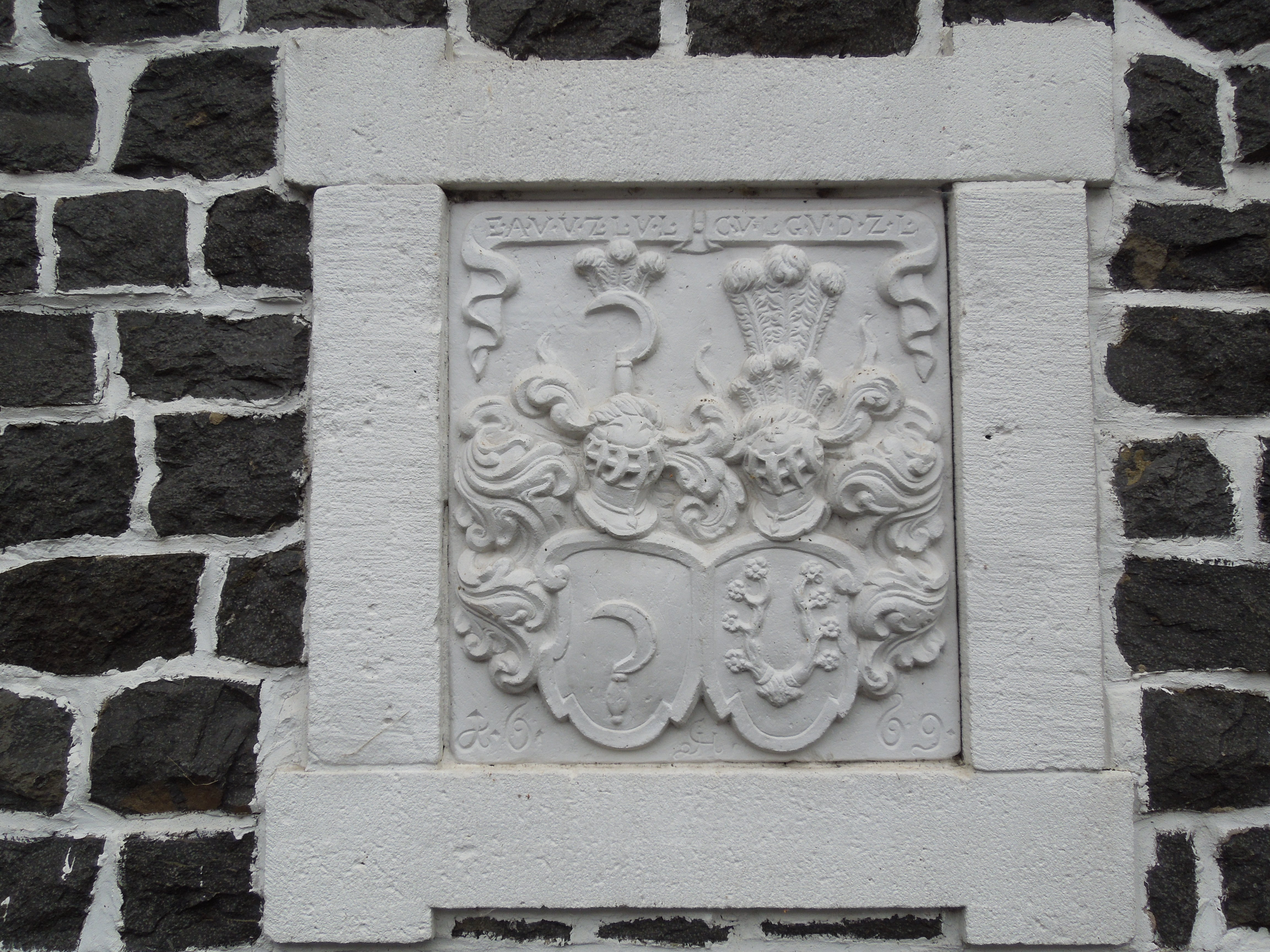 Wappenstein an der Westseite des Schlosses in Loshausen: Allianzwappen der Erbauer des Vorgängerbaus Erhard Adolph von und zu Lüder und Loshausen (Sichel) und seiner Ehefrau Catharina geb. von Dalwigk zu Lichtenfels (Hirschgeweih mit acht Rosen), datiert 1669